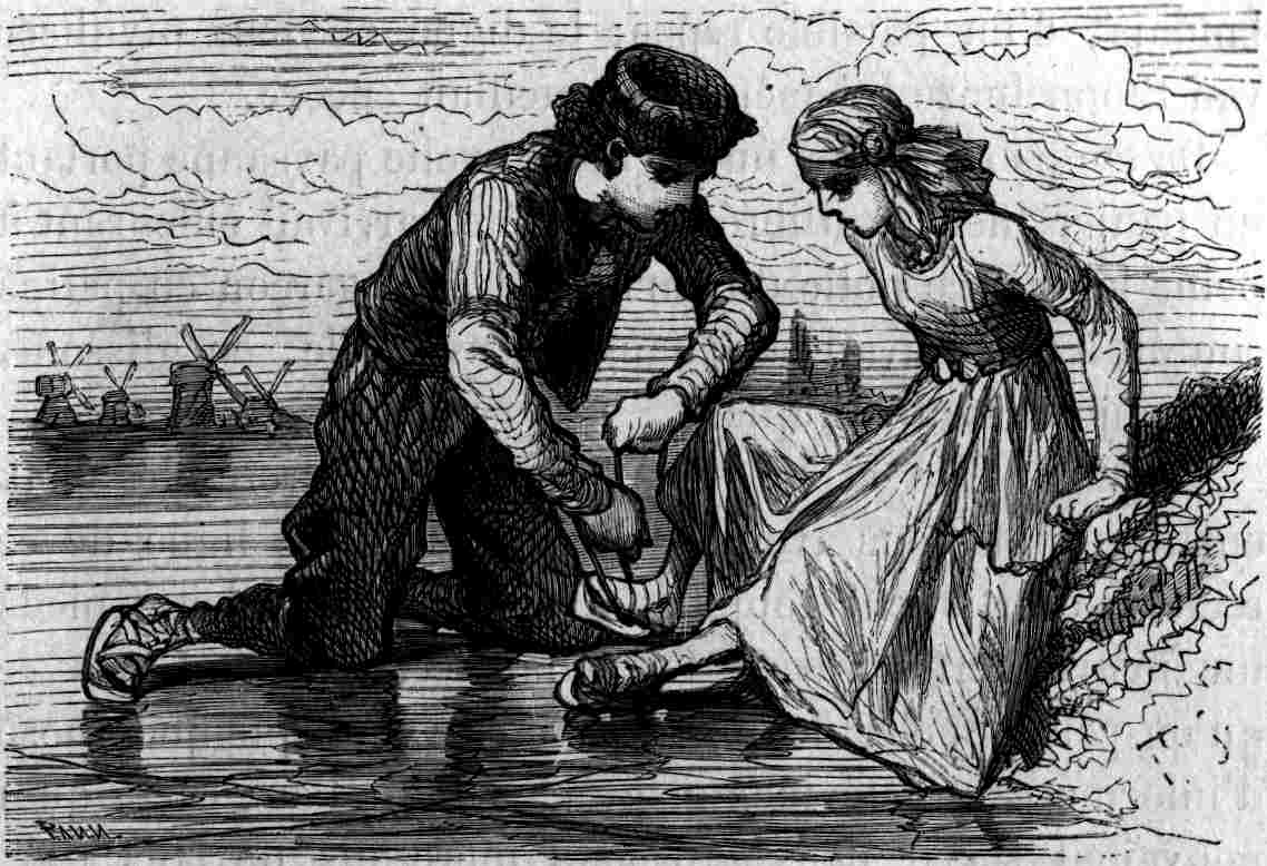 Les Patins d’argent, éditeur Hetzel et Cie, bibliothèque d’éducation et de récréation